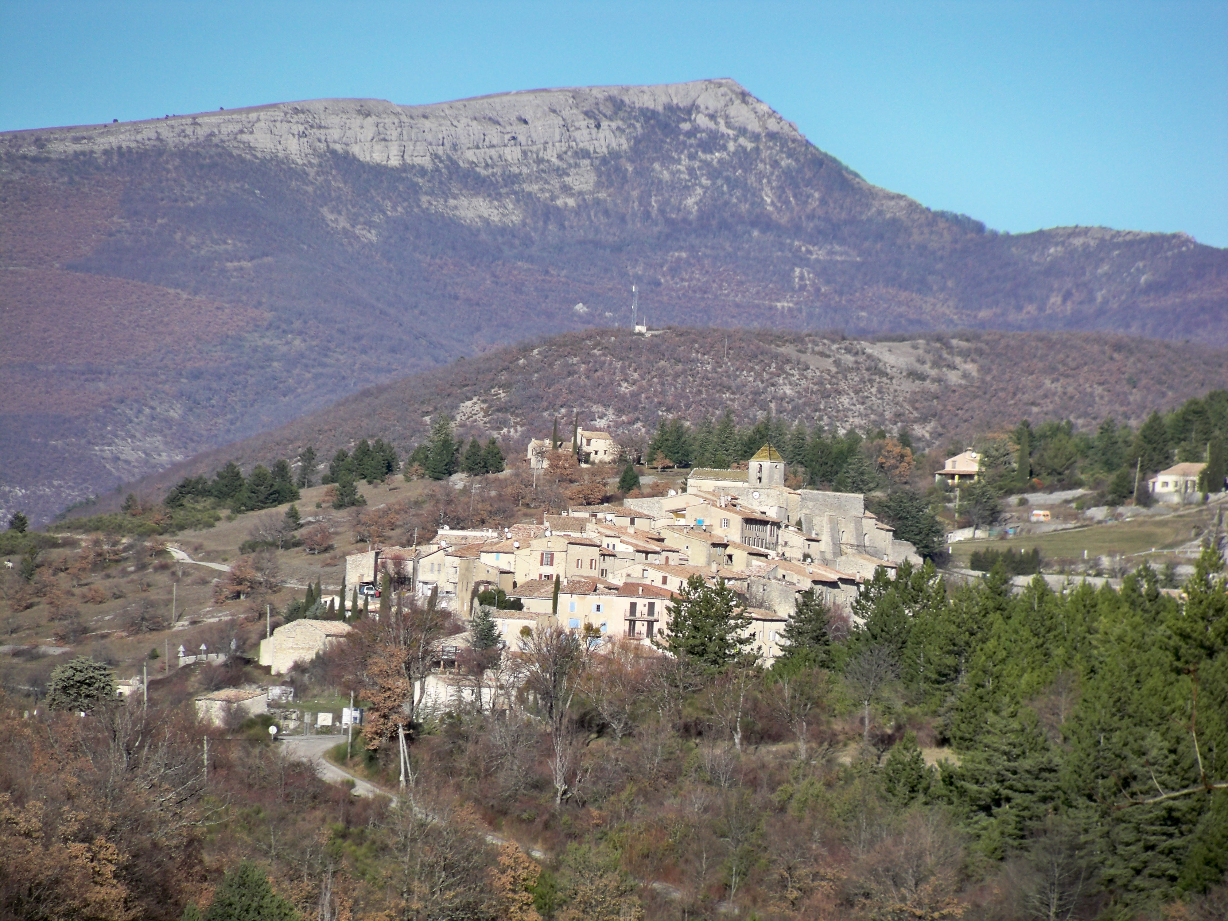 vue sur le village d'Aurel (Vaucluse)